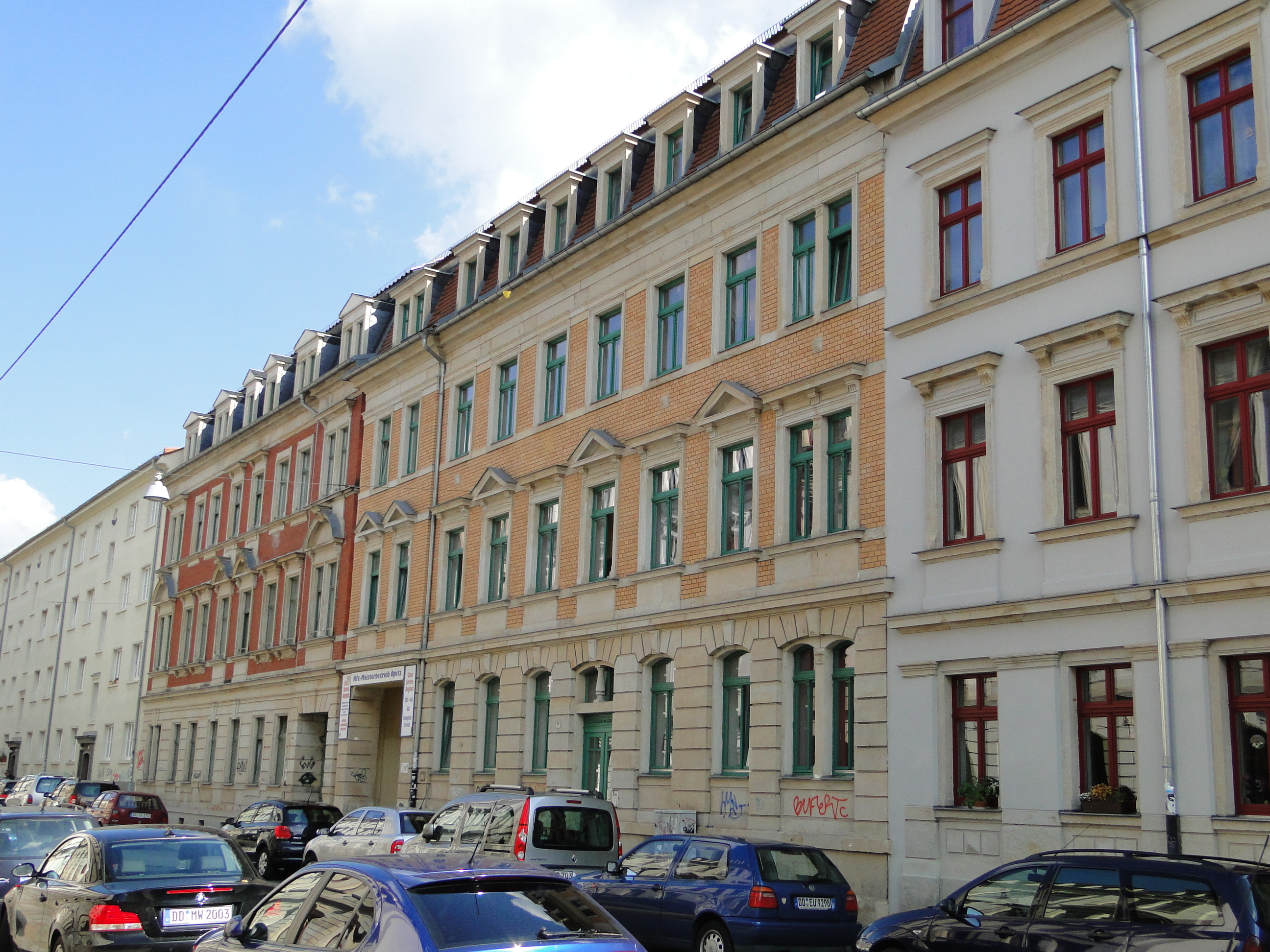 Kulturdenkmal Förstereistraße 18 Dresden